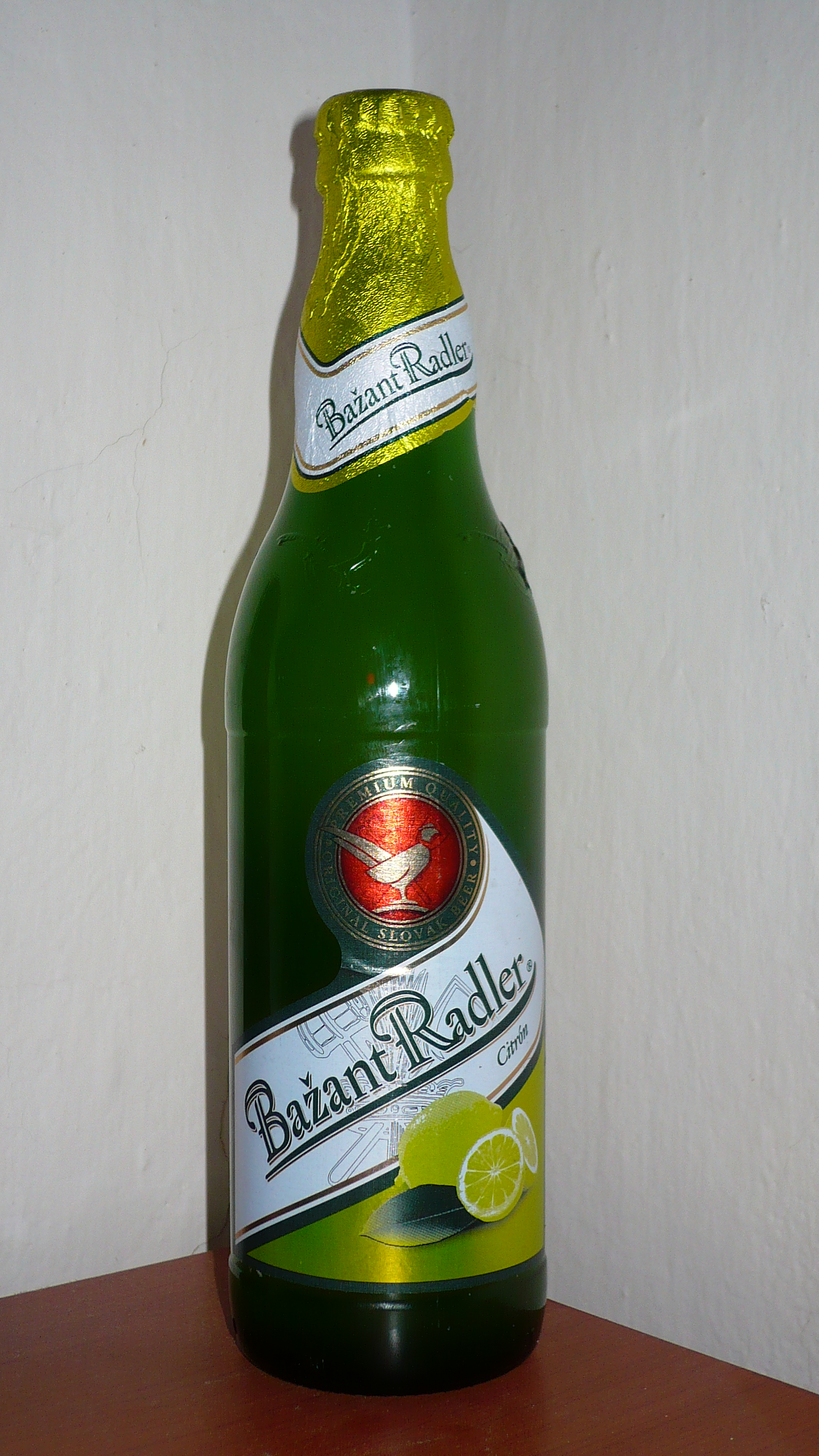 0,5 l BažantRadler